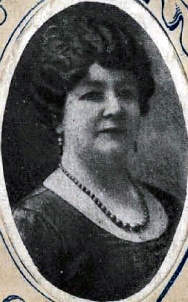 Celinda Arregui de Rodicio (? - abril de 1941) fue una política, escritora, profesora y activista feminista chilena más conocida por su labor en pro de los derechos de las mujeres en el ámbito político, social y civil en Chile